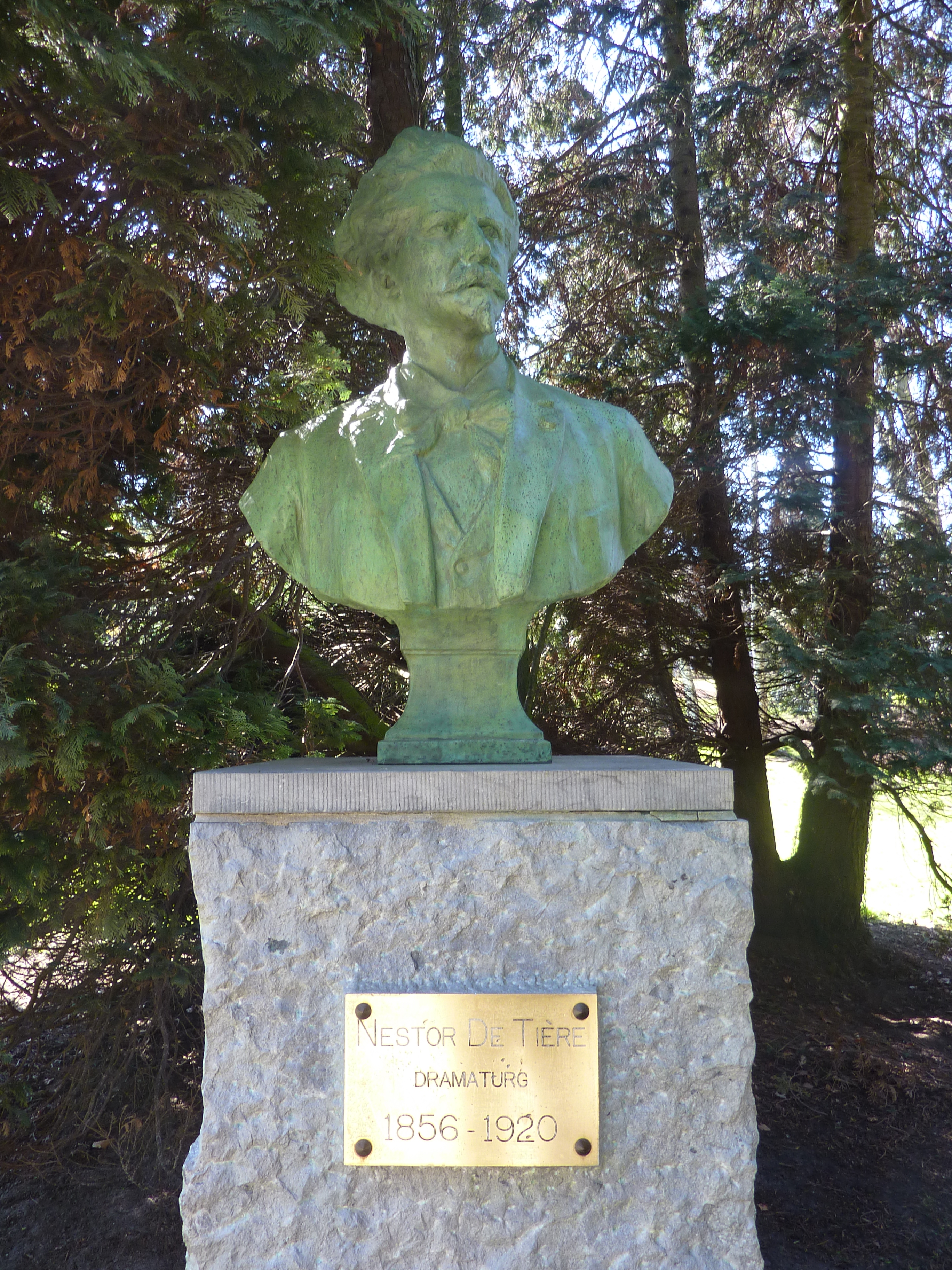 Buste de Nestor de Tière par Frans Huygelen au parc Josaphat à Schaerbeek, Bruxelles, Belgique.